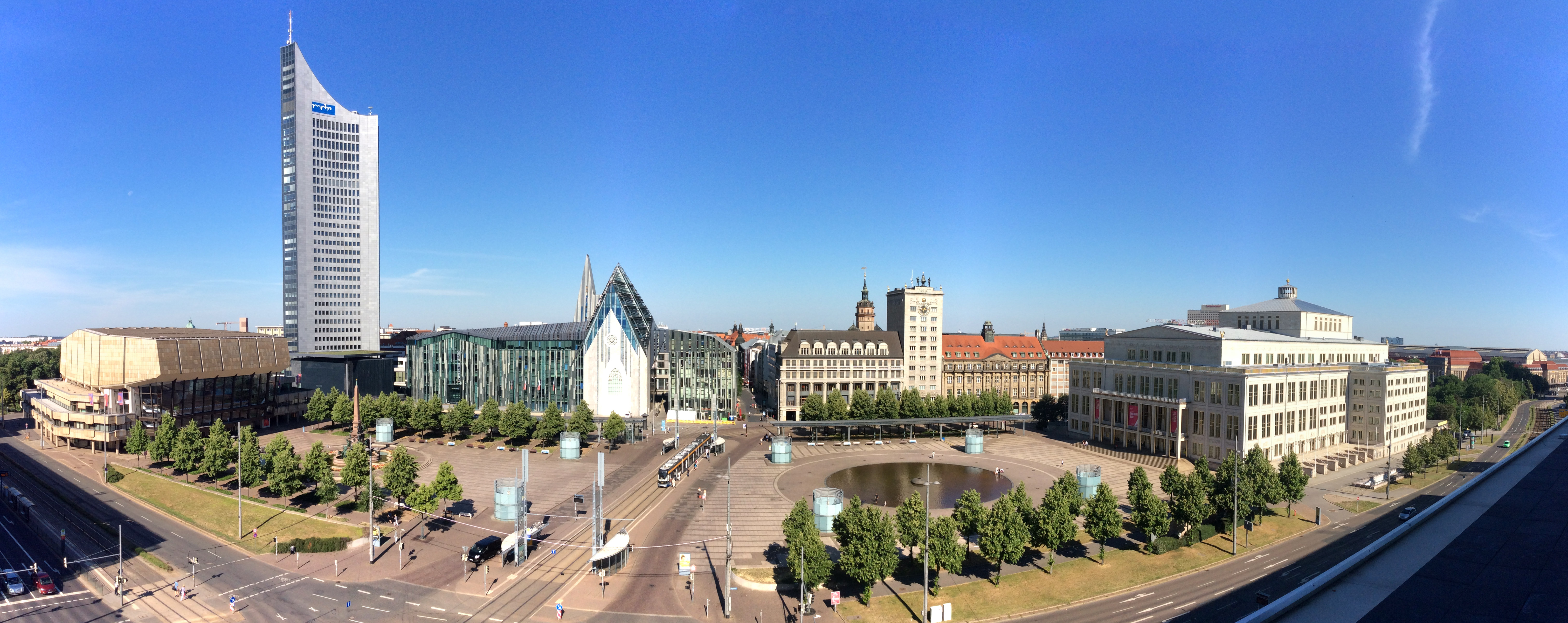 Augustusplatz in Leipzig: Von links nach rechts: Gewandhaus, und davor erkennbar der Mendebrunnen, Neues Augusteum (links der Mitte), Opernhaus